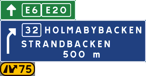 Skylt för upplysning för avfart på motorväg. Ortsnamnen på skylten är påhittade.